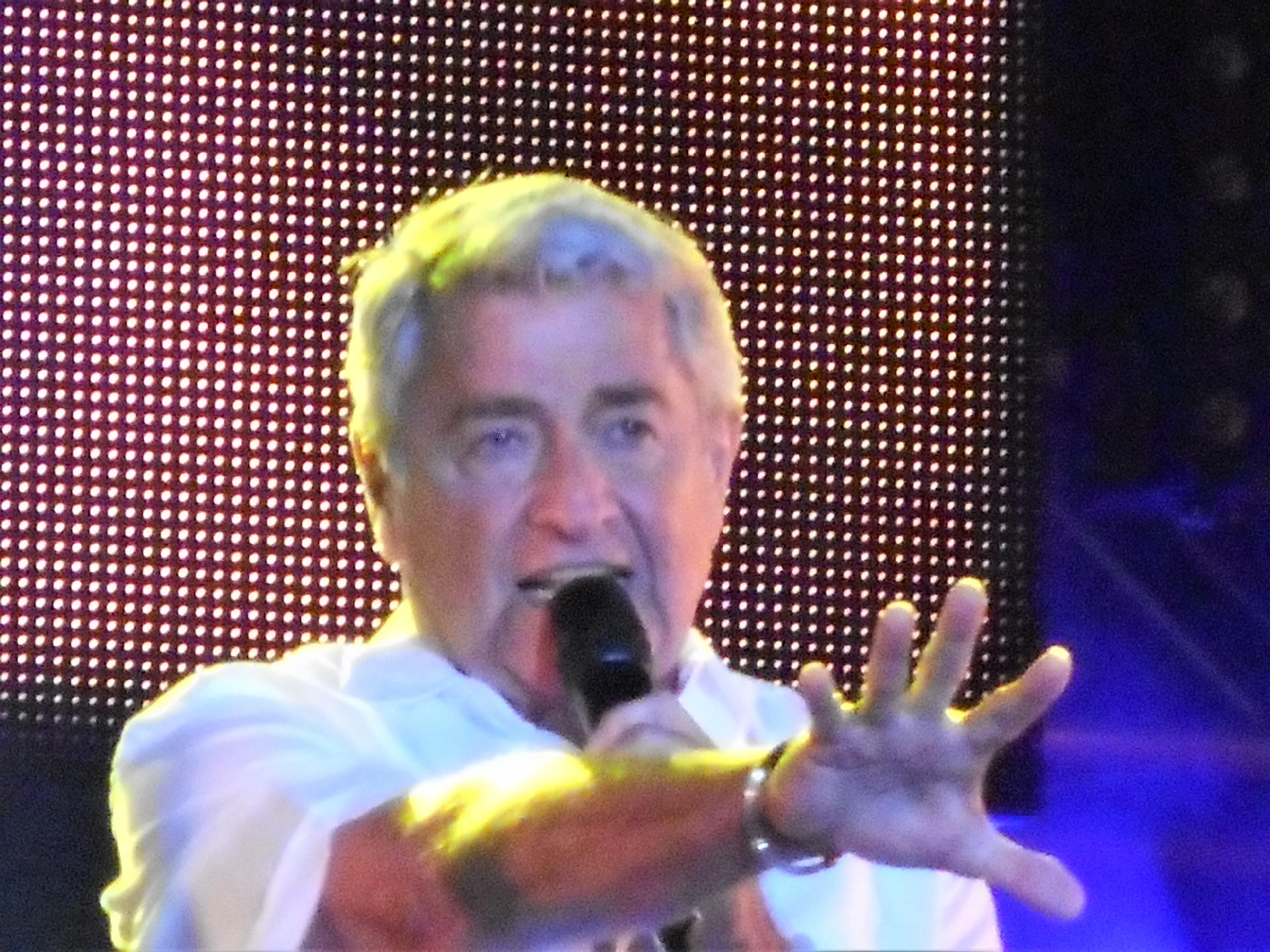 Les BB, 25 ans avec invités, à la place des Festivals, le 17 juin 2015